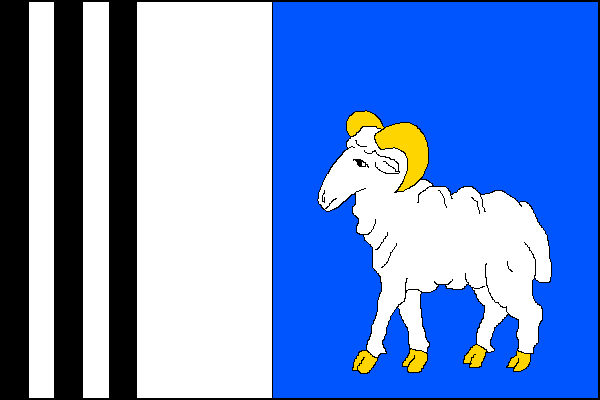 vlajka, Řečice, okres Žďár nad Sázavou